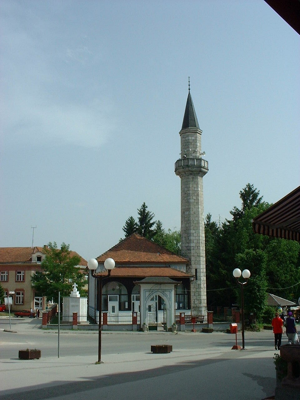 Velika Kladuša, džamija